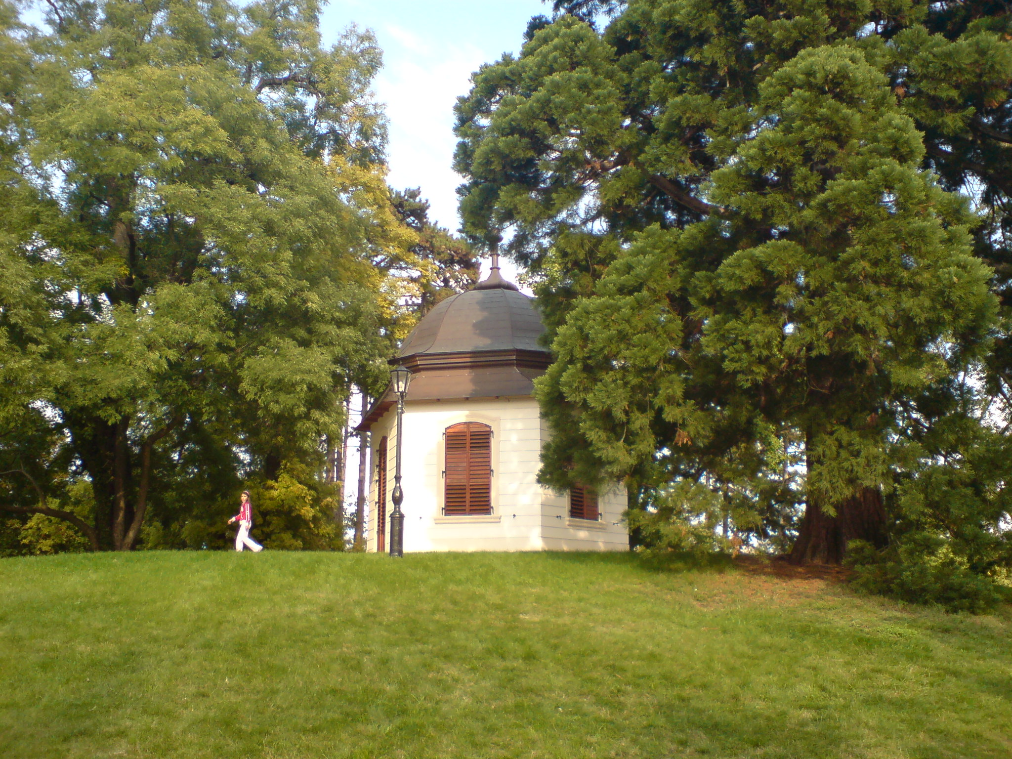 Gödöllö Königspavillon